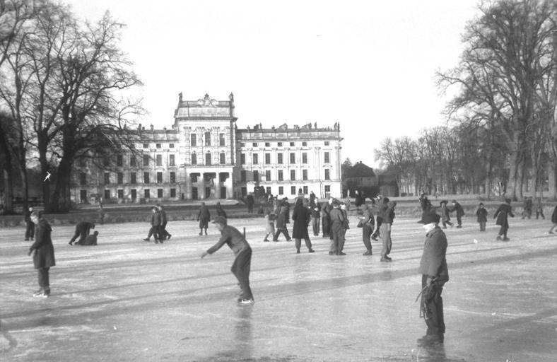 Februar 1949 Das macht Spaß! Vor dem Schloß in Ludwigslust tummelt sich Alt und Jung auf dem zugefrorenen Schloßteich. Illus / ADN 4.2.1949